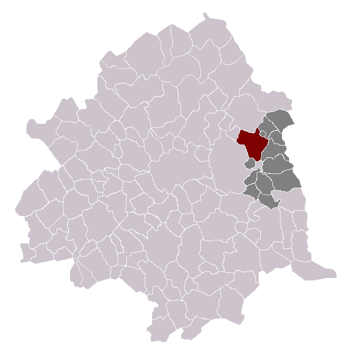 Hem dans son canton et son arrondissement.